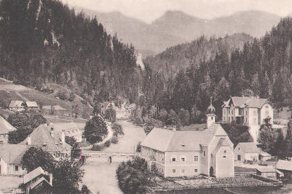 Mürzsteg